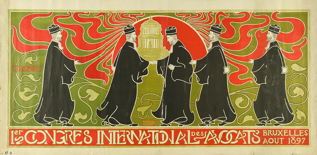 1er Congres International des Avocats Bruxelles Aout 1897